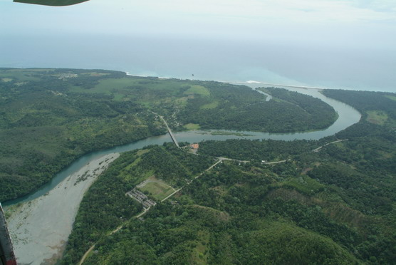 Rio Toa, este es el río más caudaloso de Cuba